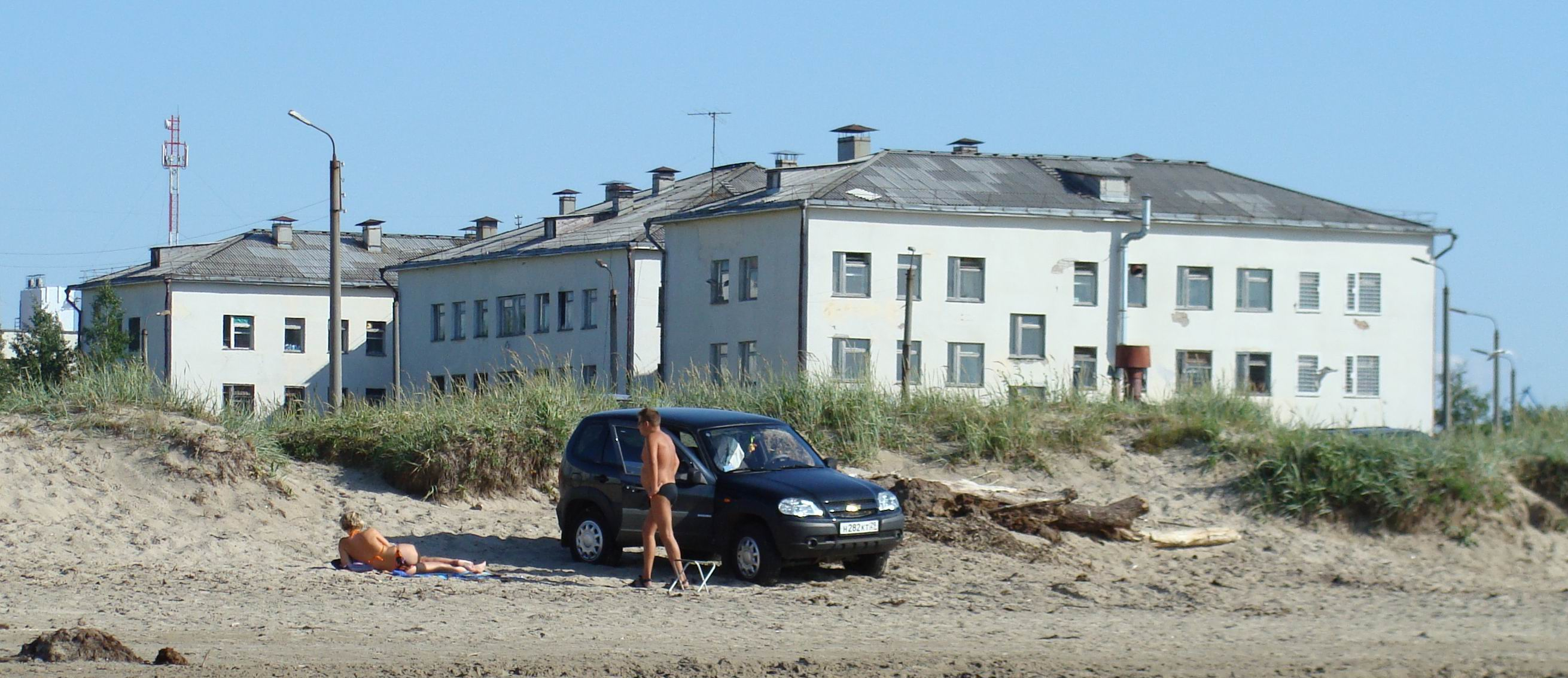 На сленге: Дурдом, дурик, психушка, дом умалишенных, дума, палата № 6 и т.п.